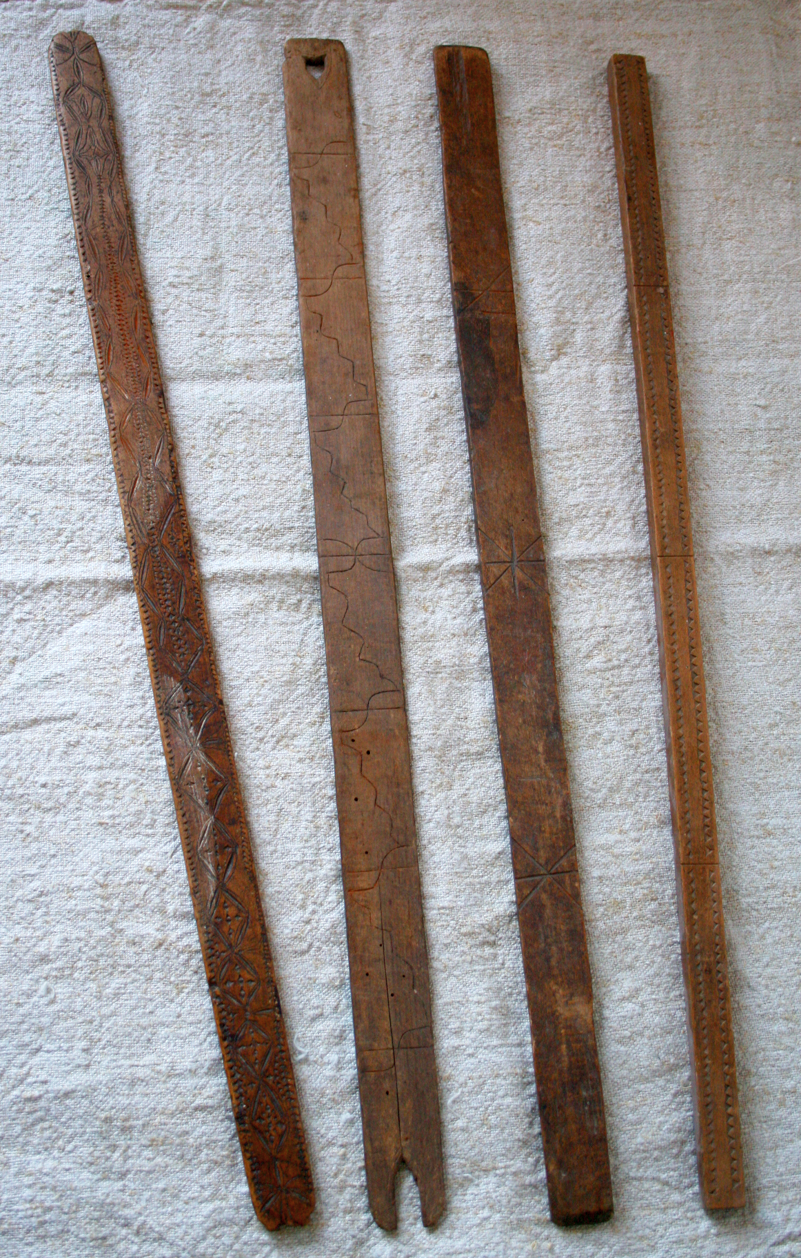 Régi faragott singek Erdélyből (Sepsiszentgyörgy)